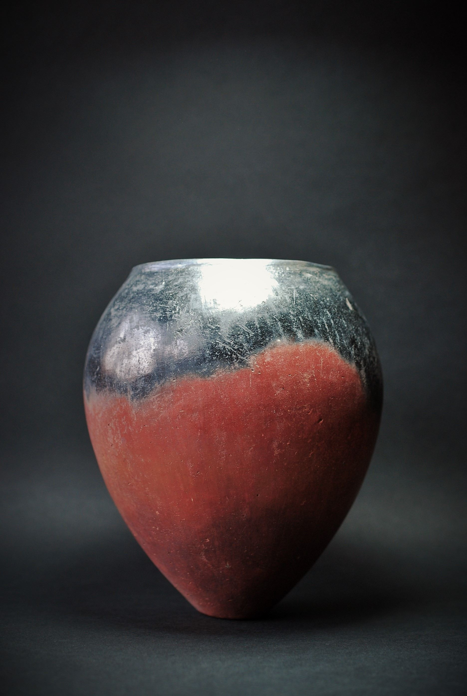 Vase ovoïde Nagada I, appelé Black Top